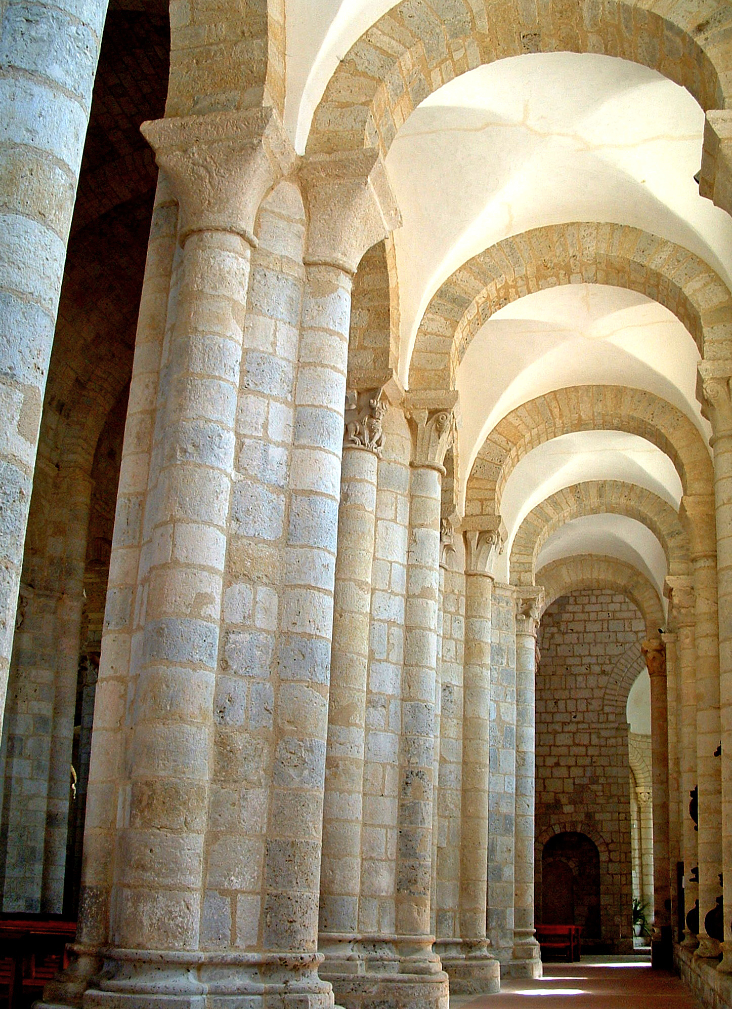 Moirax - Église Notre-Dame - Collatéral Sud